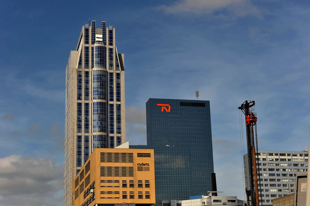 Codarts is de Hogeschool voor de kunsten aan het Kruisplein. Nationale Nederlanden staat aan het Weena. The Westin Rotterdam is het enige vijfsterrenhotel van Rotterdam en is gelegen op de eerste 14 verdiepingen van de 149 meter hoge Millennium Toren gelegen aan het Weena.